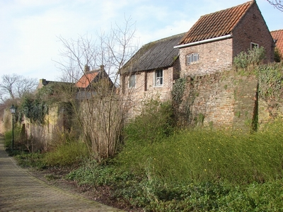 Nedersaksies: Rhenen Stadsmure